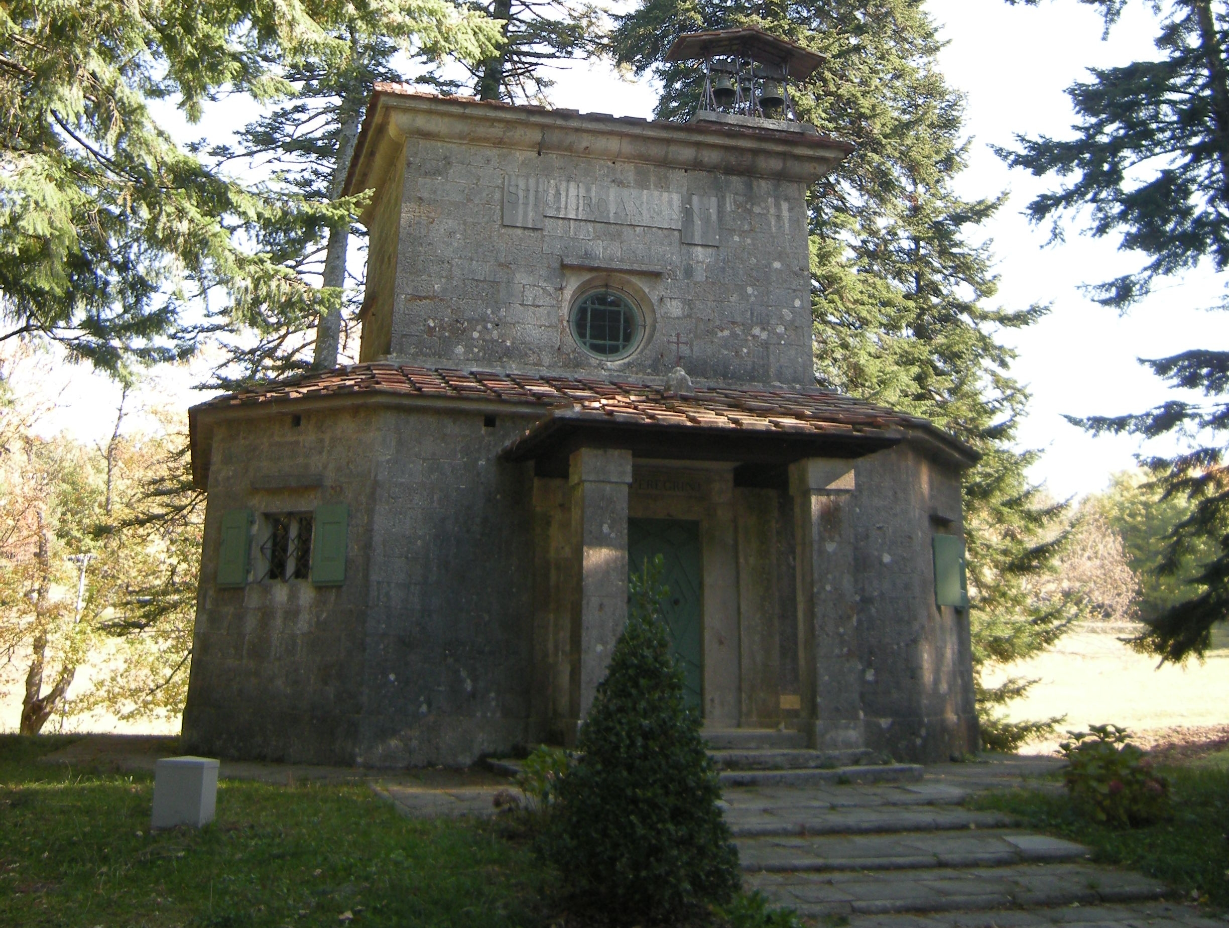 Piccola chiesa presso la Macchia Antonini, frazione di Piteglio